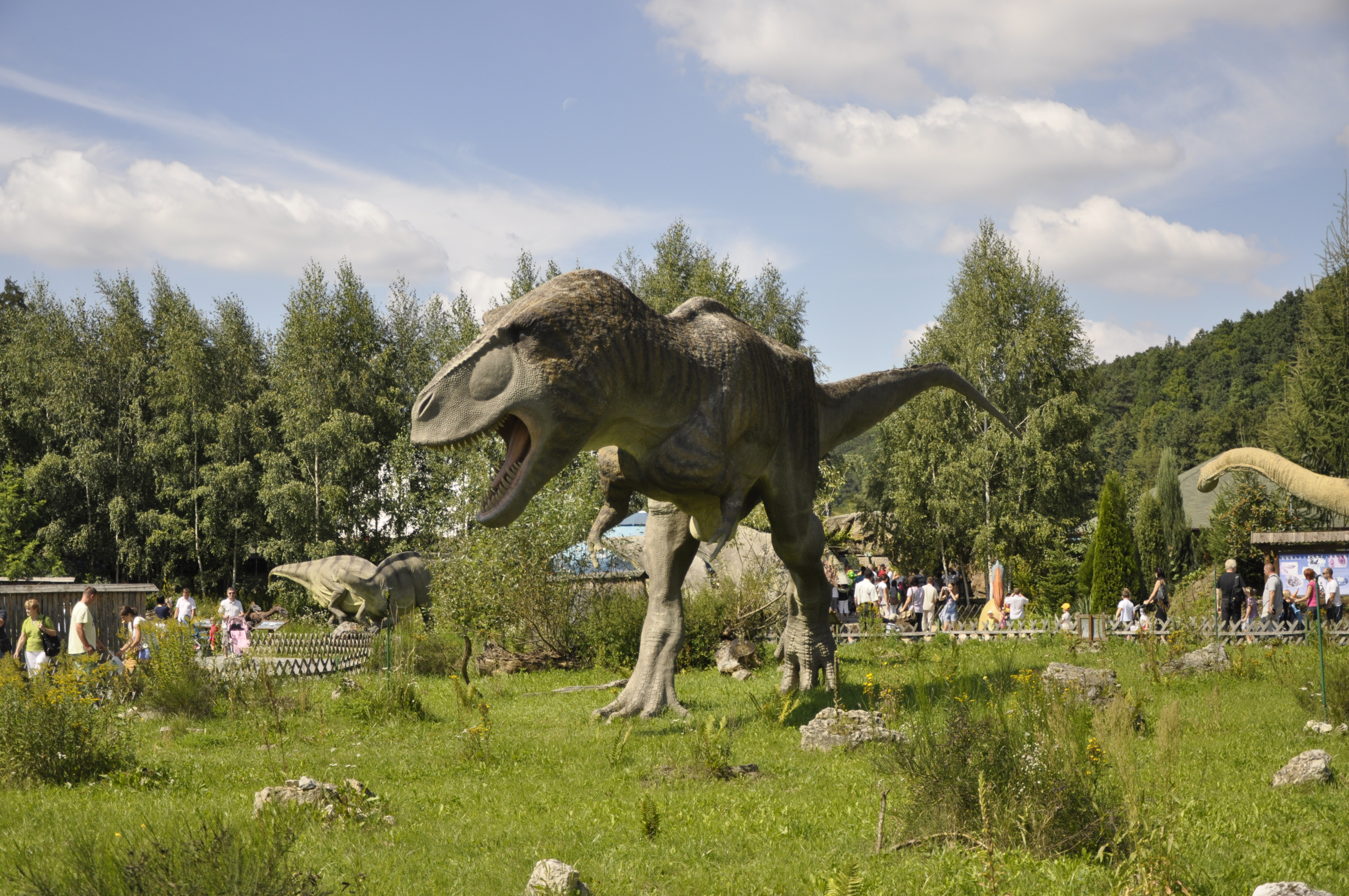 JuraPark Bałtów - Tyrannosaurus